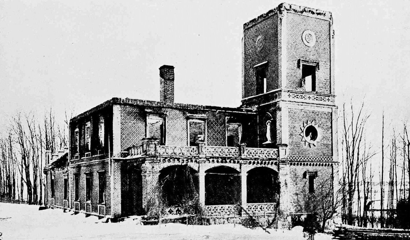 Vana-Gulbene mõisa Punane loss pärast 1905. aasta põlengut.